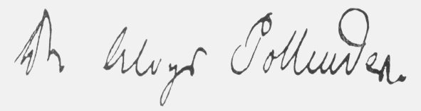 Unterschrift von Aloys Pollender